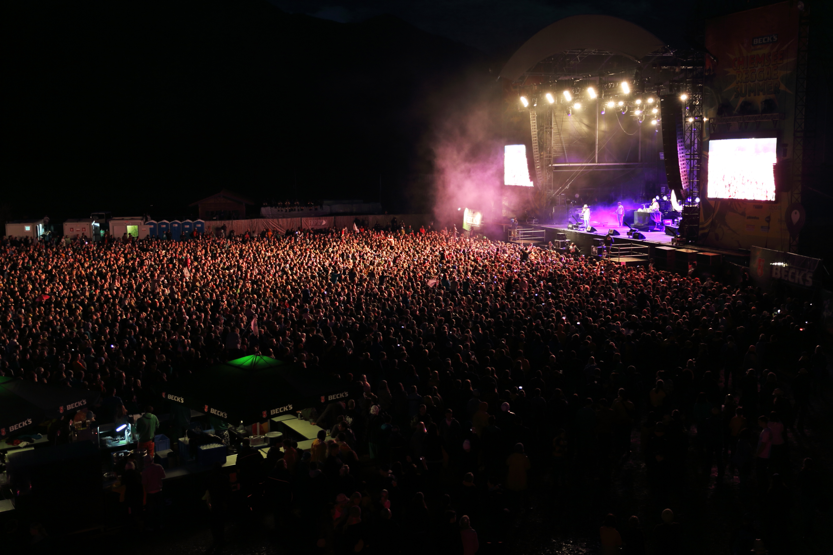 Nächtlicher Blick auf die Hauptbühne des Chiemsee Reggae Summer 2013 Festivals während dem Auftritt von Cro Festivalsommer This photo was created with the support of donations to Wikimedia Österreich and Wikimedia Deutschland in the context of the CPB project "Festival Summer".